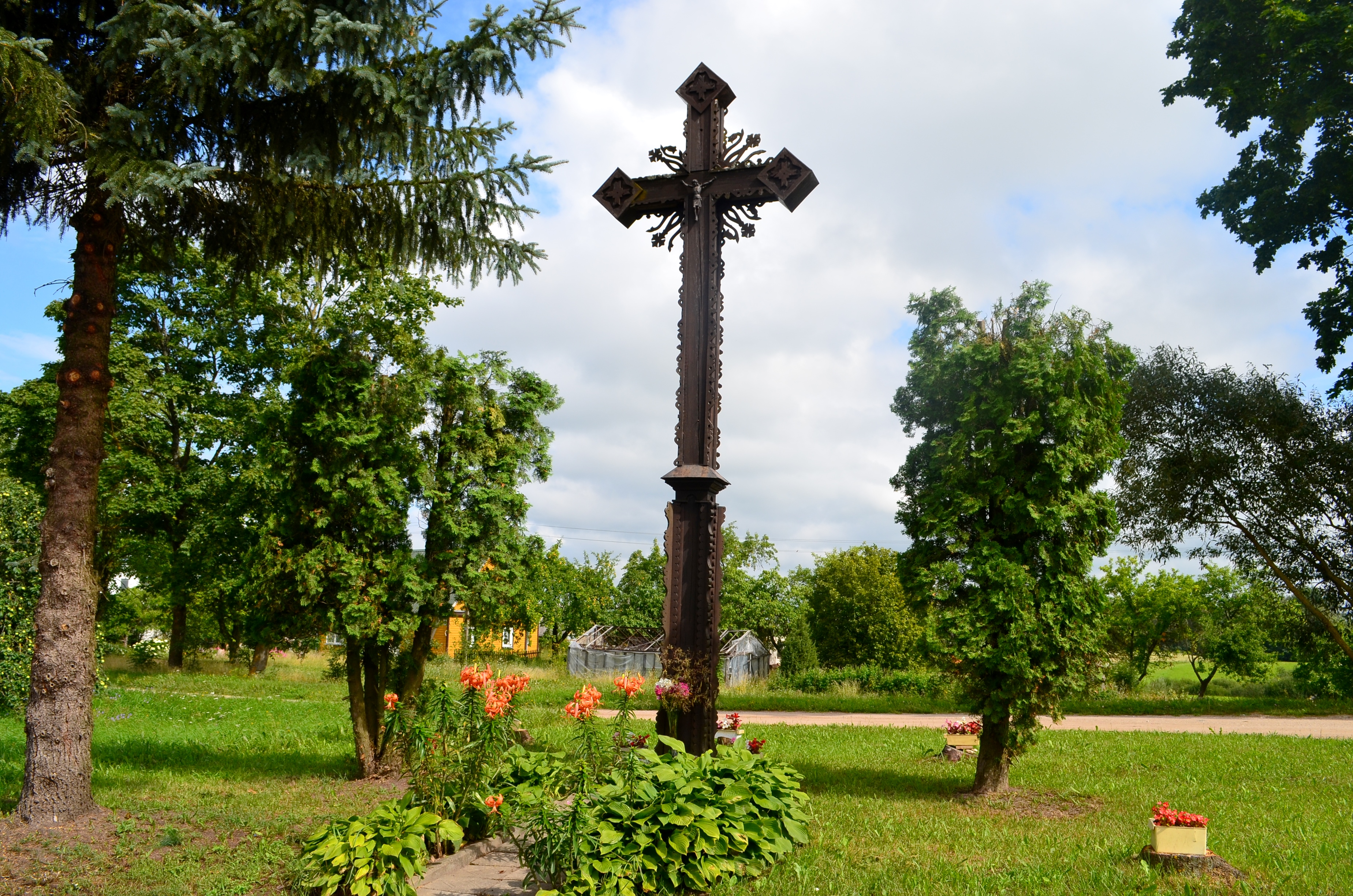 Mockėnai, Utenos raj.